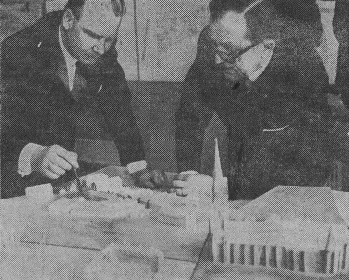 Länsbibliotikareie Åke Wretblad (t.v) och arkitekt Bo Cederlög vid modell av nya biblioteksbyggnaden